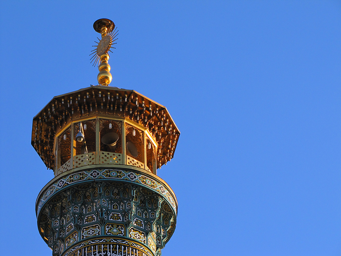 آستانه حضرت عبدالعظیم و بقاع متصل آن